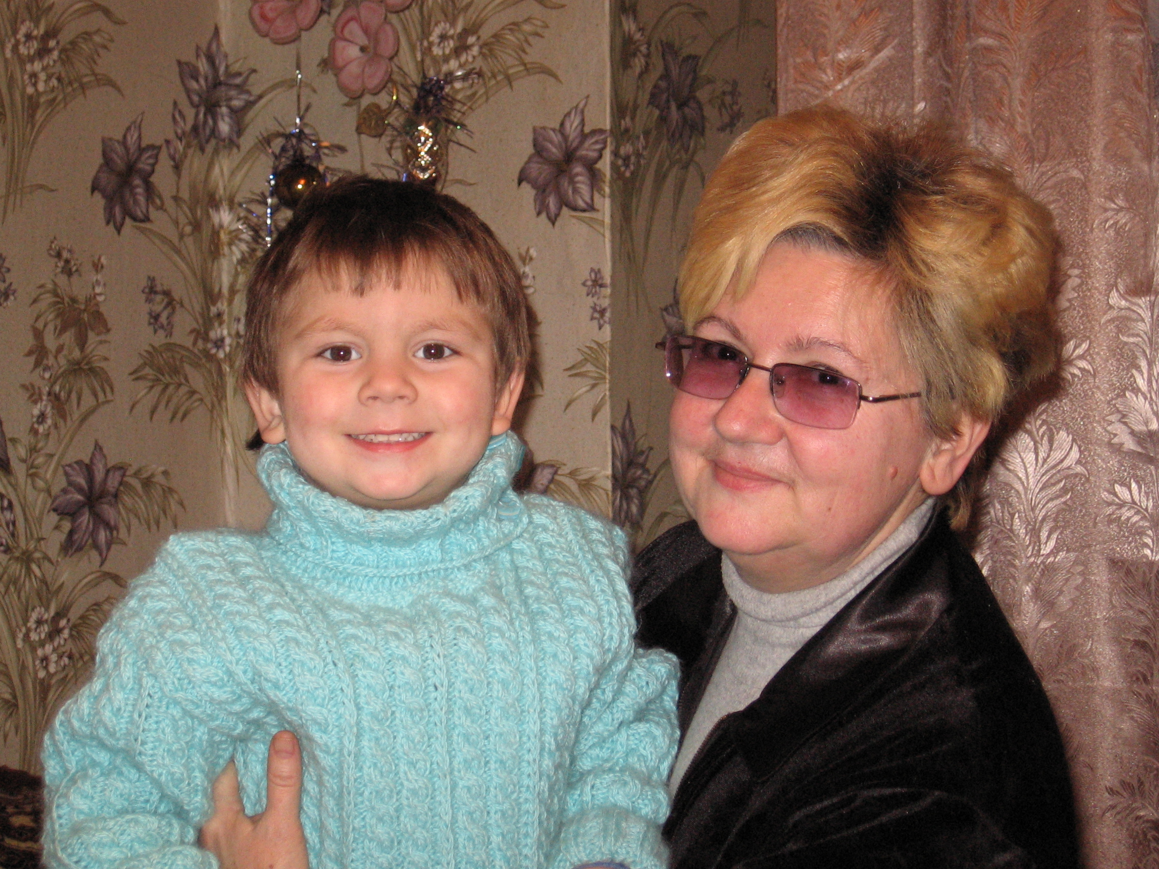 Онук: Фото